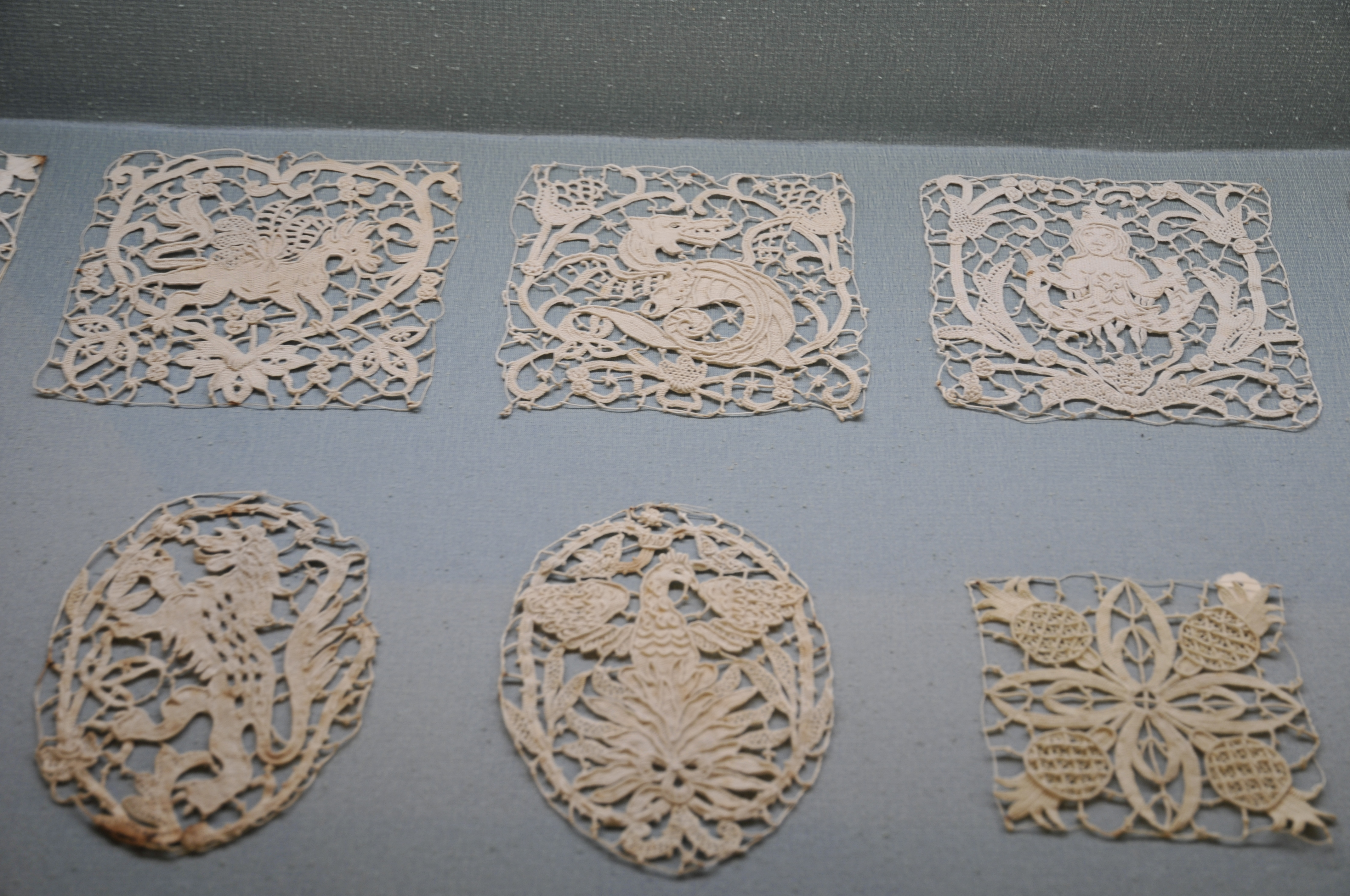 Palazzo del Comune This is a photo of a monument which is part of cultural heritage of Italy.